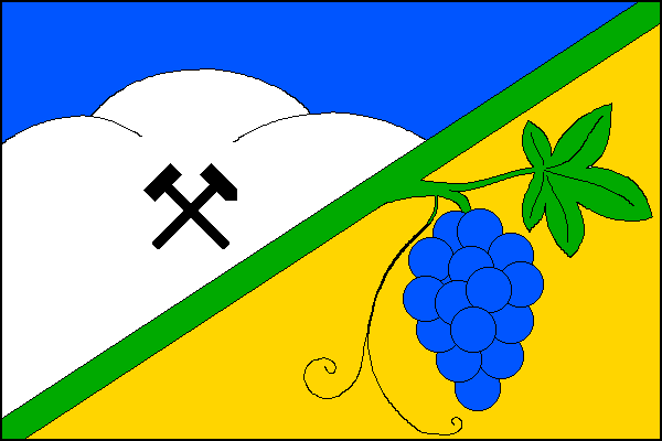 vlajka, Vinary, okres Ústí nad Orlicí